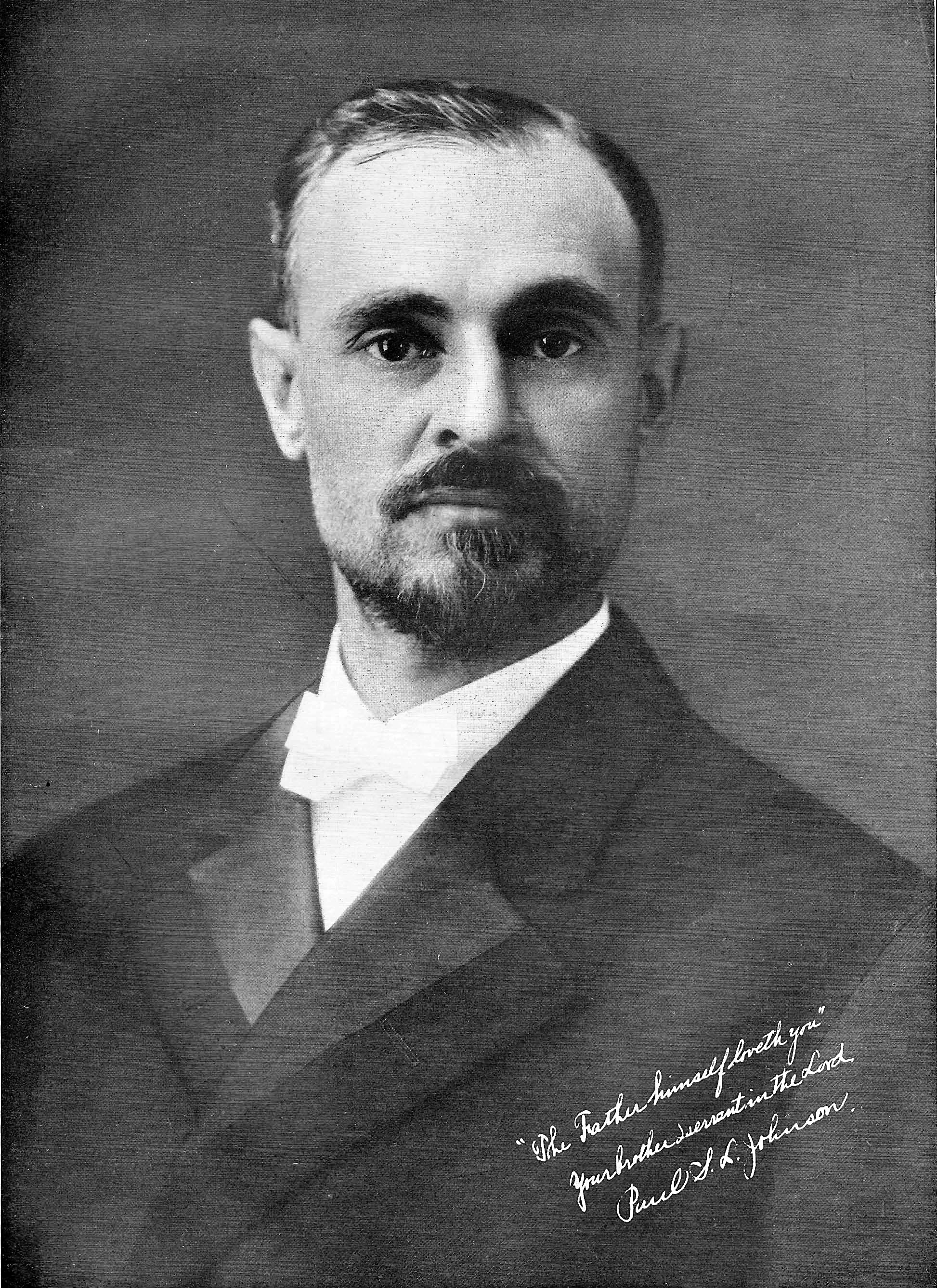 Das Bild stammt aus meiner persönlichen Sammlung. Das Foto wurde ursprünglich 1911 gemacht, sämtliche Urheberrechte sind erloschen.